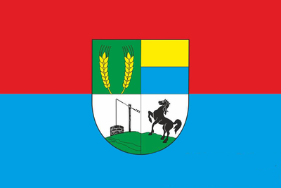 Прапор с. Семенівка (Білгород-Дністровський район)